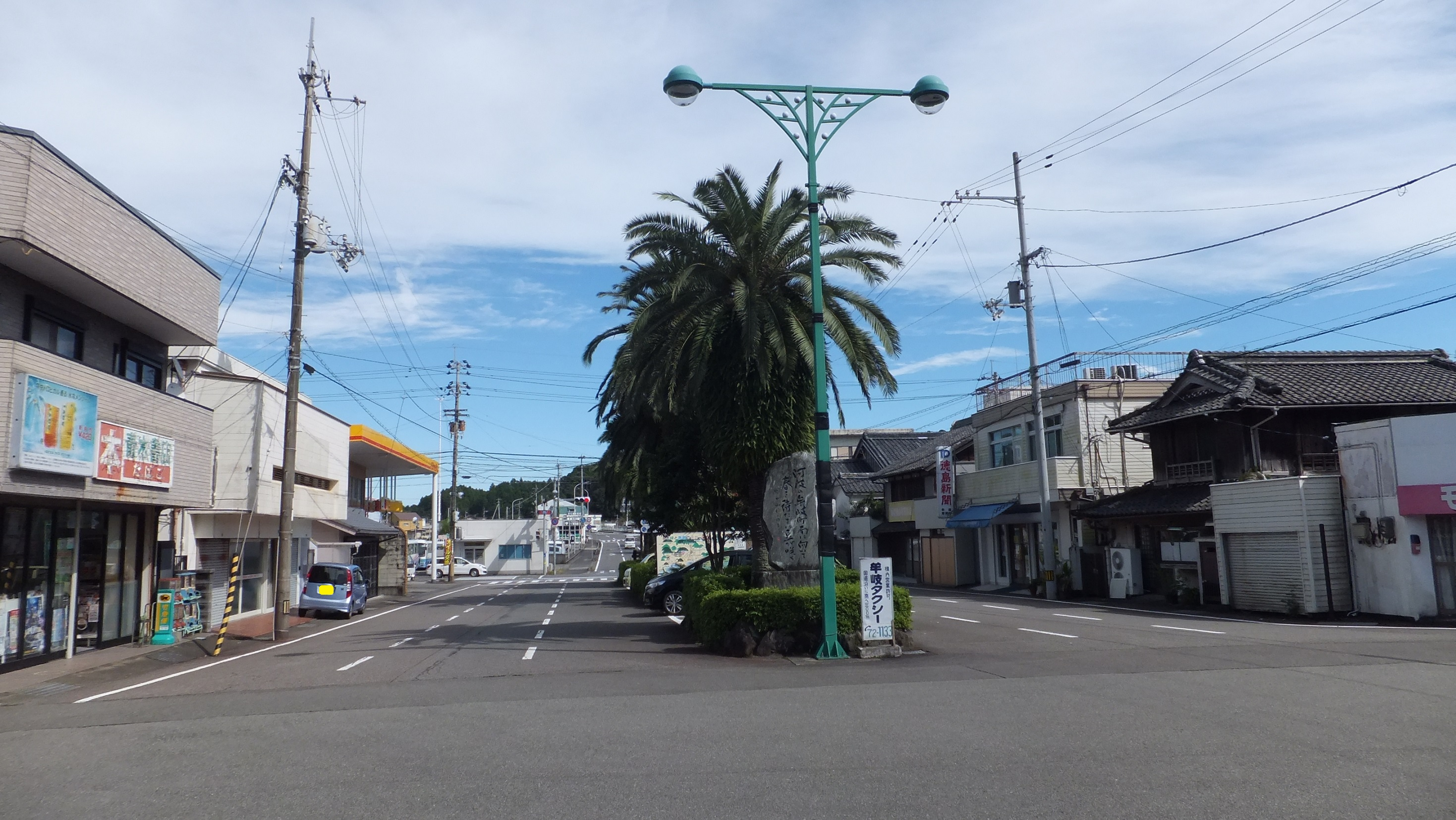 JR牟岐線 牟岐駅前 （徳島県海部郡牟岐町 2015年）